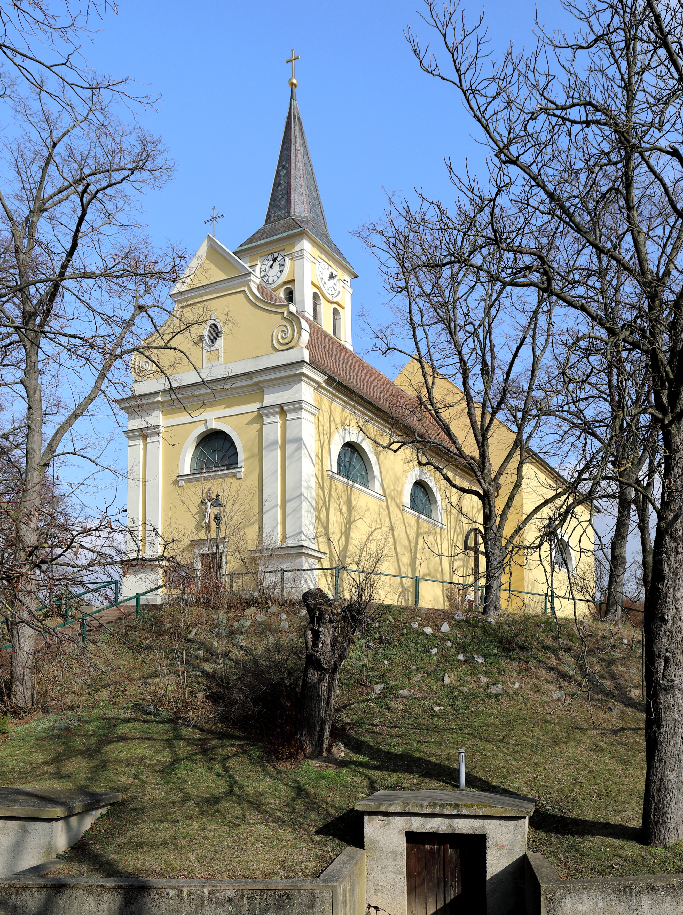 Westsüdwestansicht der röm.-kath. Pfarrkirche hl. Koloman in der niederösterreichischen Marktgemeinde Ebenthal. Der Sakralbau wurde im 17. Jahrhundert in erhöhter Lage im Südosten des Ortes errichtet. Von 1831 bis 1840 wurde die Kirche umgebaut und erweitert. Die Westfassade mit Doppelpilastern und einem großen, zentralen Lunettenfenster ist spätklassizistisch.